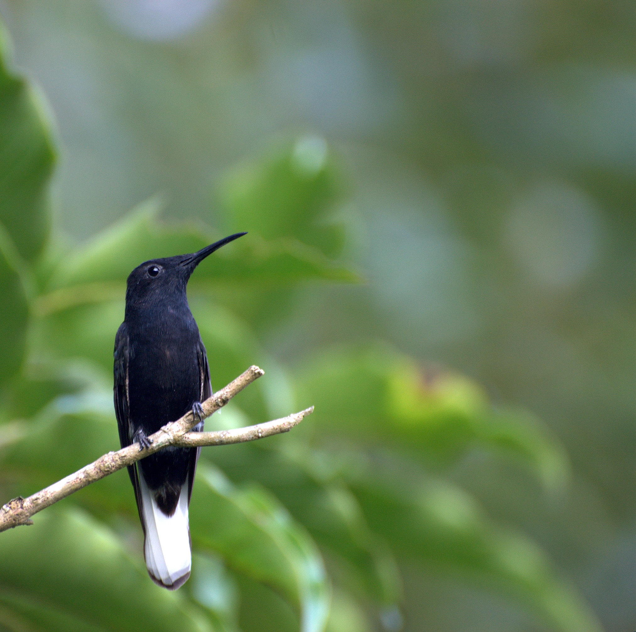 Florisuga fusca (syn: Melanotrochilus fuscus), from Chácara Antonio Wuo, Mogi das Cruzes-SP (Brazil)